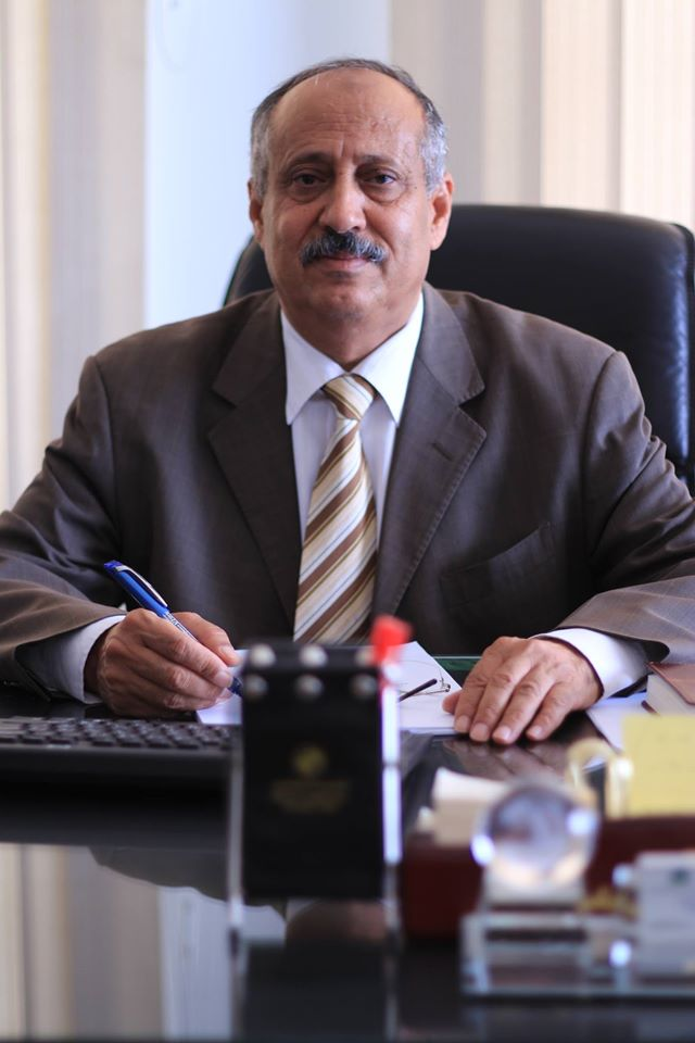 صوره شخصيه